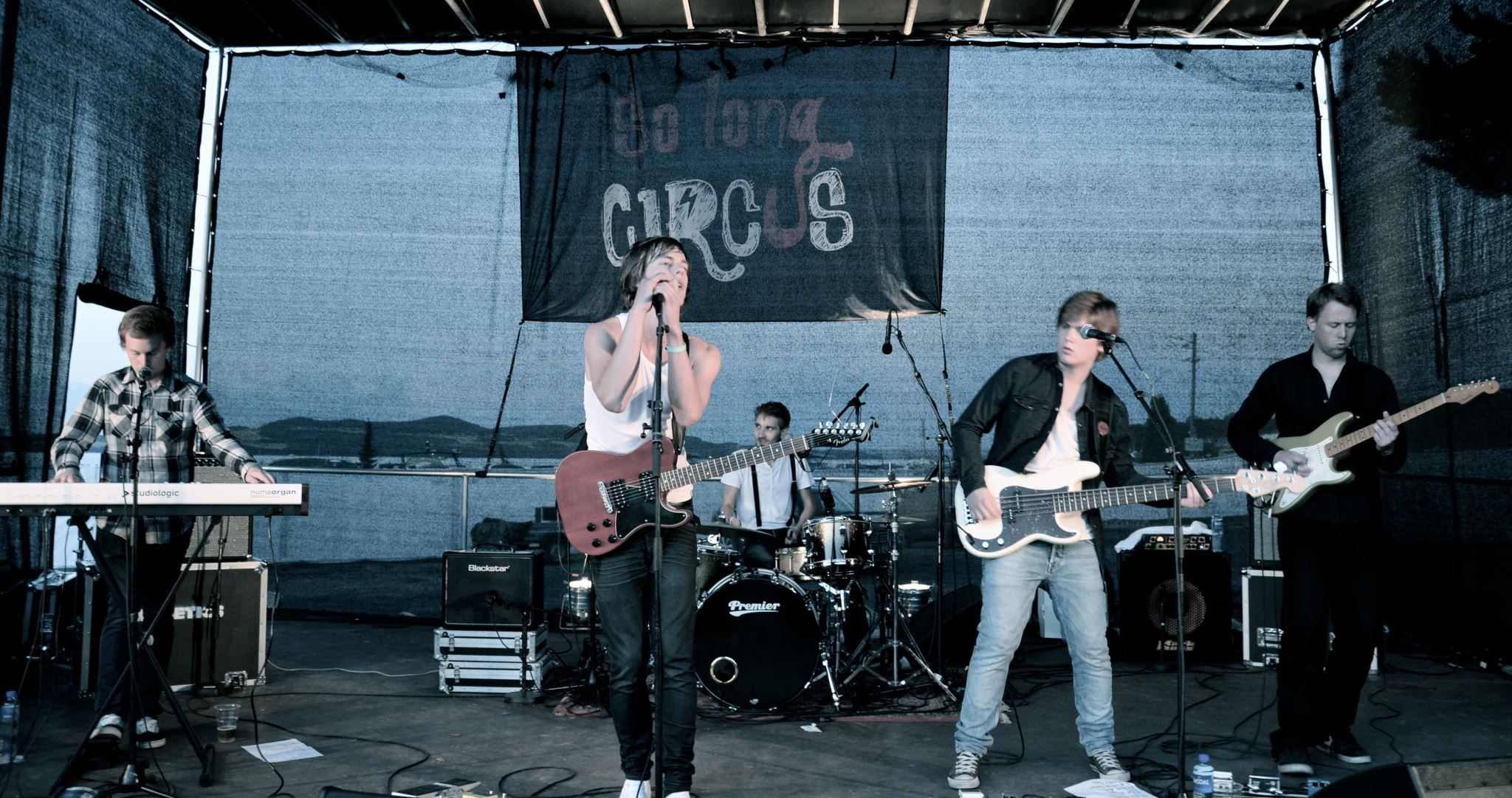 So Long Circus under festivalen "Skvulp 2011"